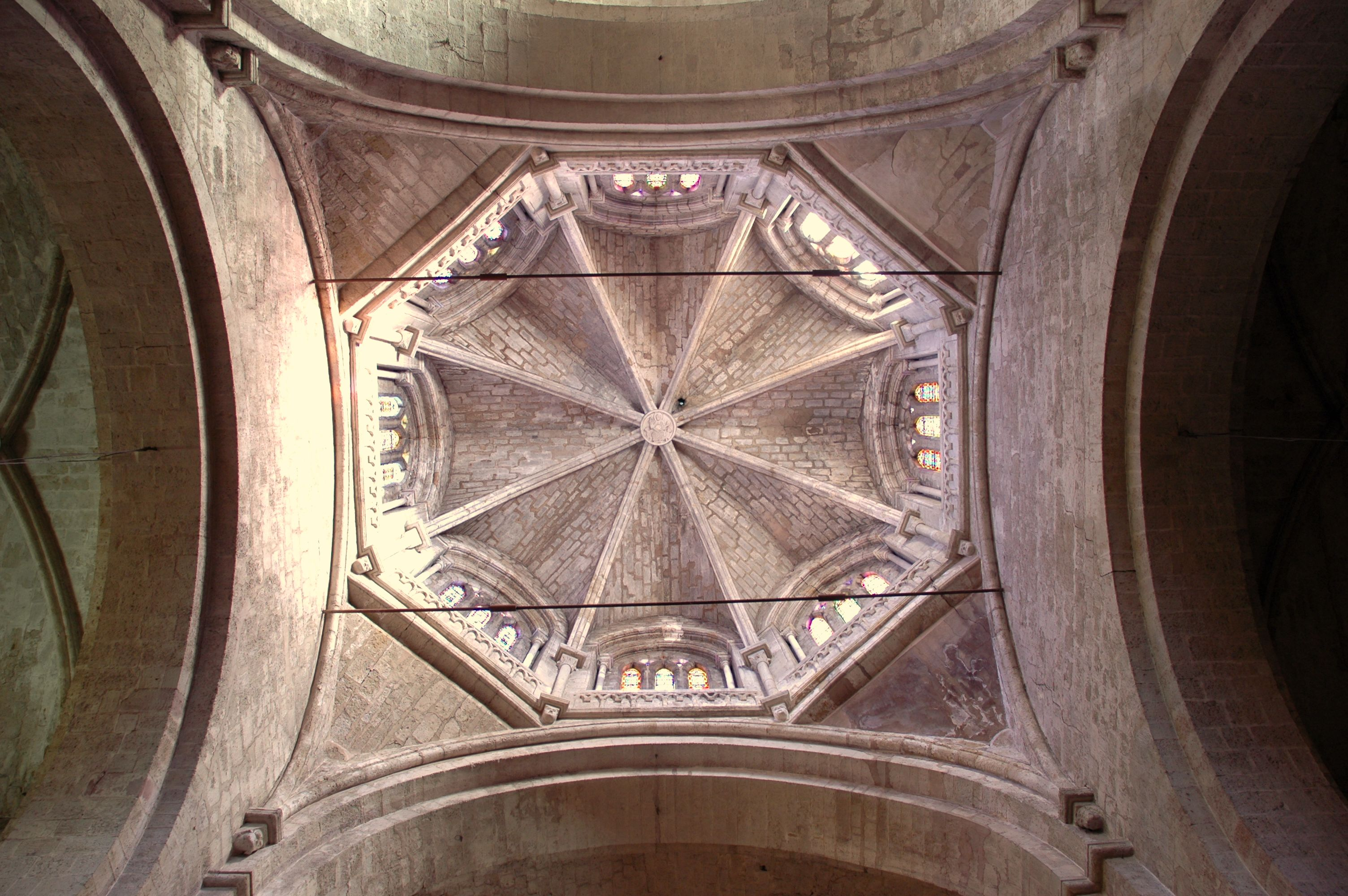 Monestir de Sant Cugat - Interior Cimbori